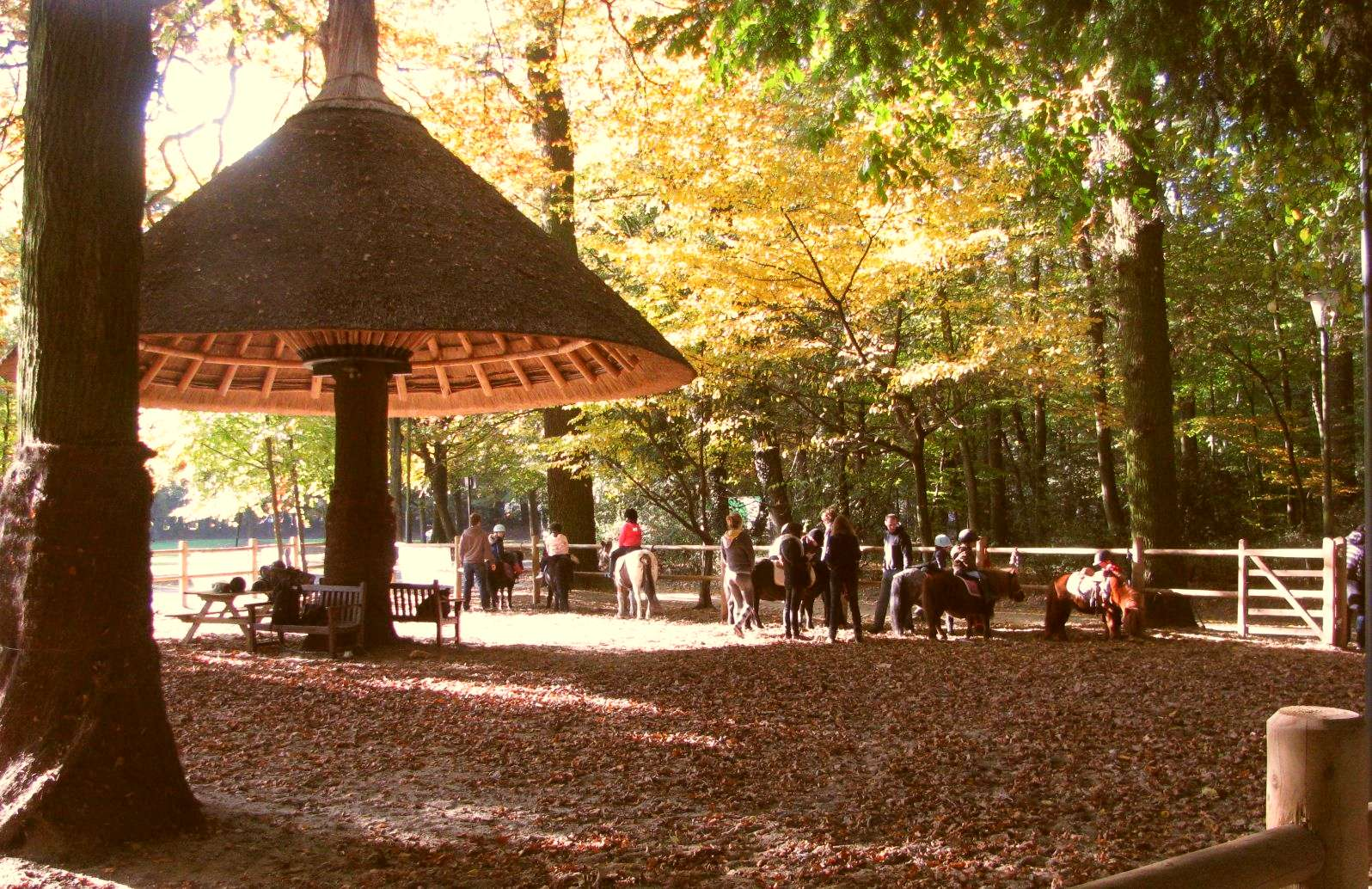 Reflets de l'automne dans le Champignon et les petits poneys